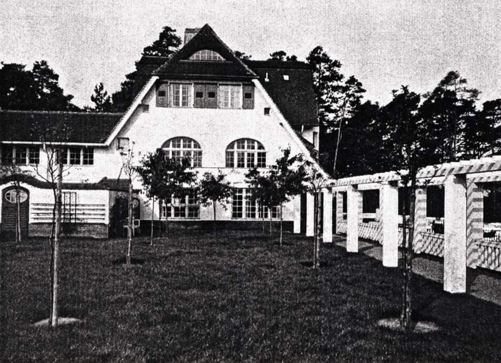 Haus Muthesius Gartenansicht (Original text: Haus Muthesius, Privathaus des Architekten Hermann Muthesius von 1906/09) Hinweis zur Lizenz: gemeinfrei wegen Ablauf der 70-Jahre Schutzfrist, weil der Künstler und Autor (Hermann Muthesius) 1927 gestorben ist.